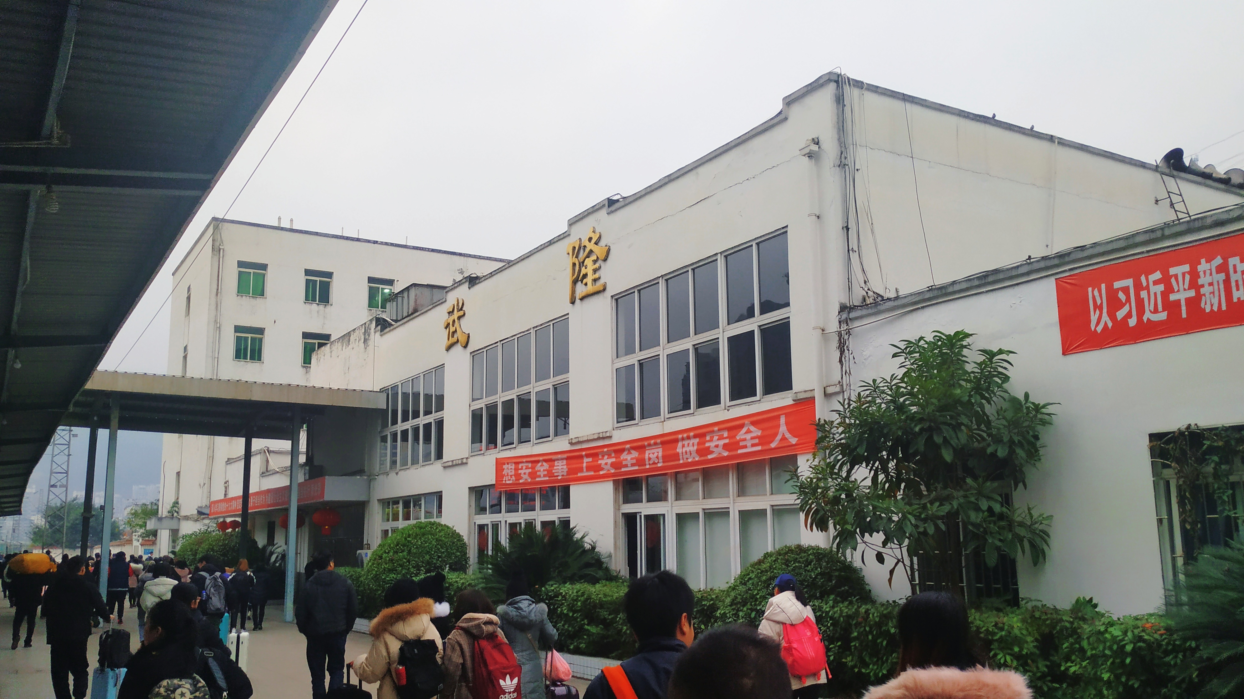 中文（中国大陆）: 重庆武隆车站